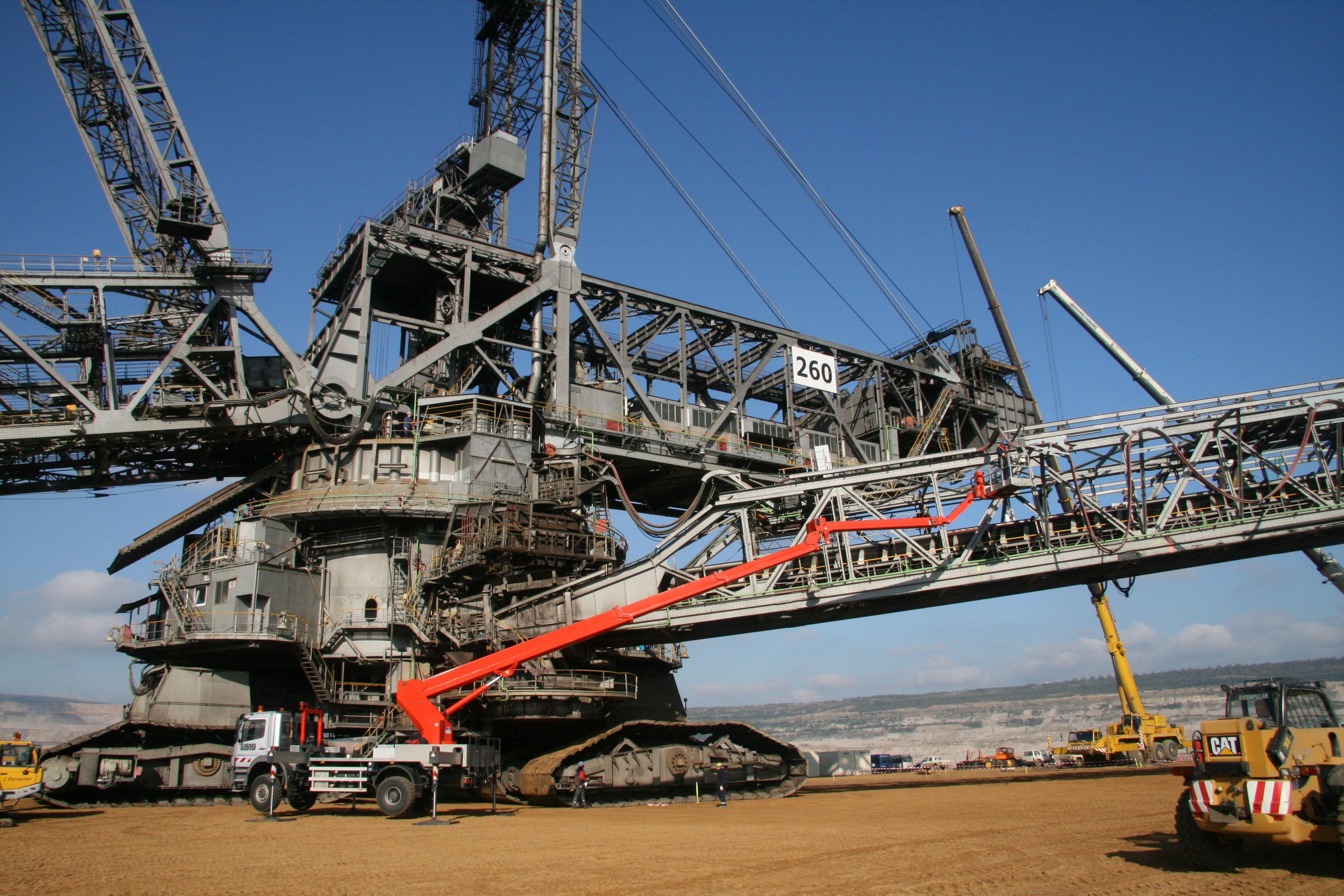 Ein Ruthmann-Steiger T 370 beim Arbeitseinsatz am Bagger 260 im Tagebau Hambach